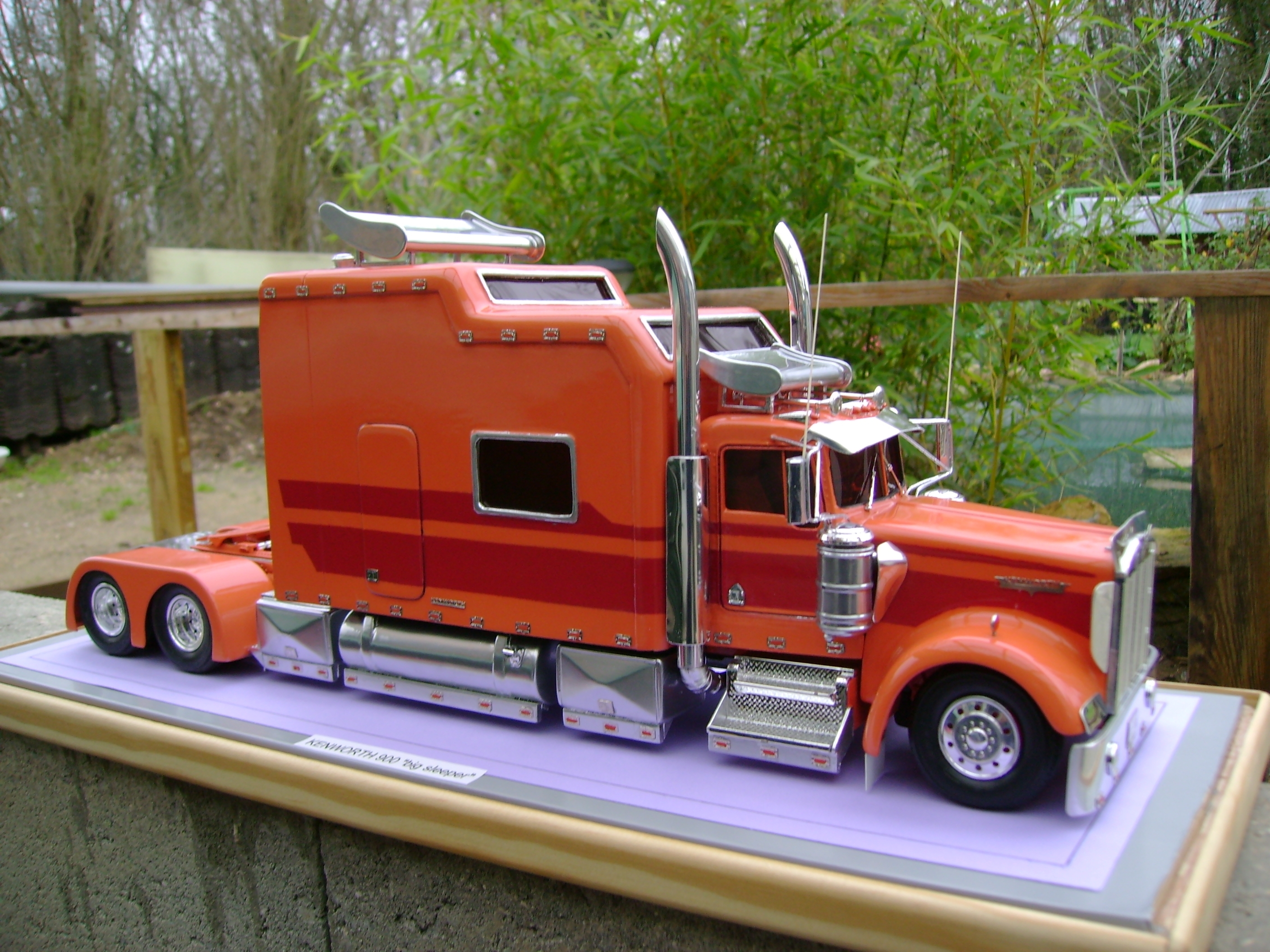 Maquette d'un tracteur routier Kenworth avec Sleeper box réalisée par Christian Chapson.